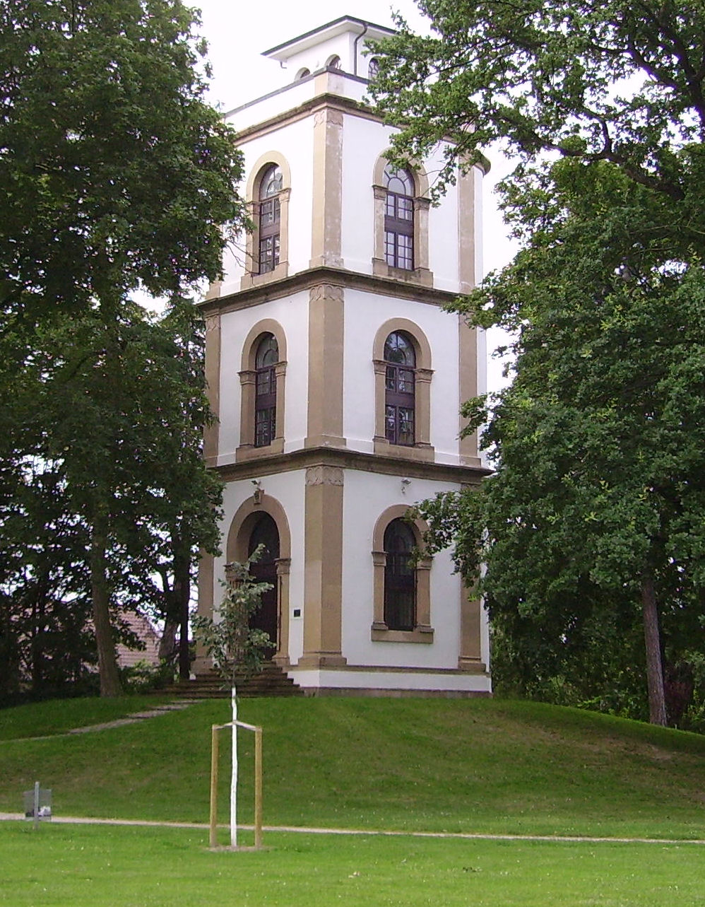 view of Limburgerhof, Germany. Turm war Teil des 1825-1830 von Graf Theodor Waldner von Freundstein und Gemahlin Friedericke geborene von Stumm errichteten Grafensitzes.